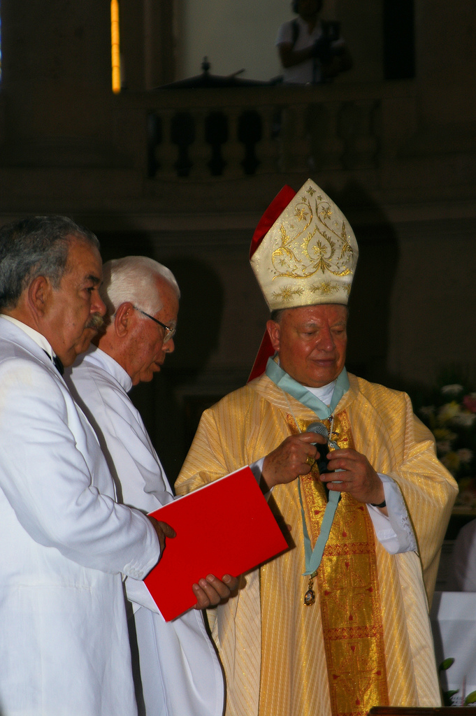 excmo. cardenal Juan Sandoval Iniguez en su visita a la piedad michoacan el dia 25 de junio de 2009